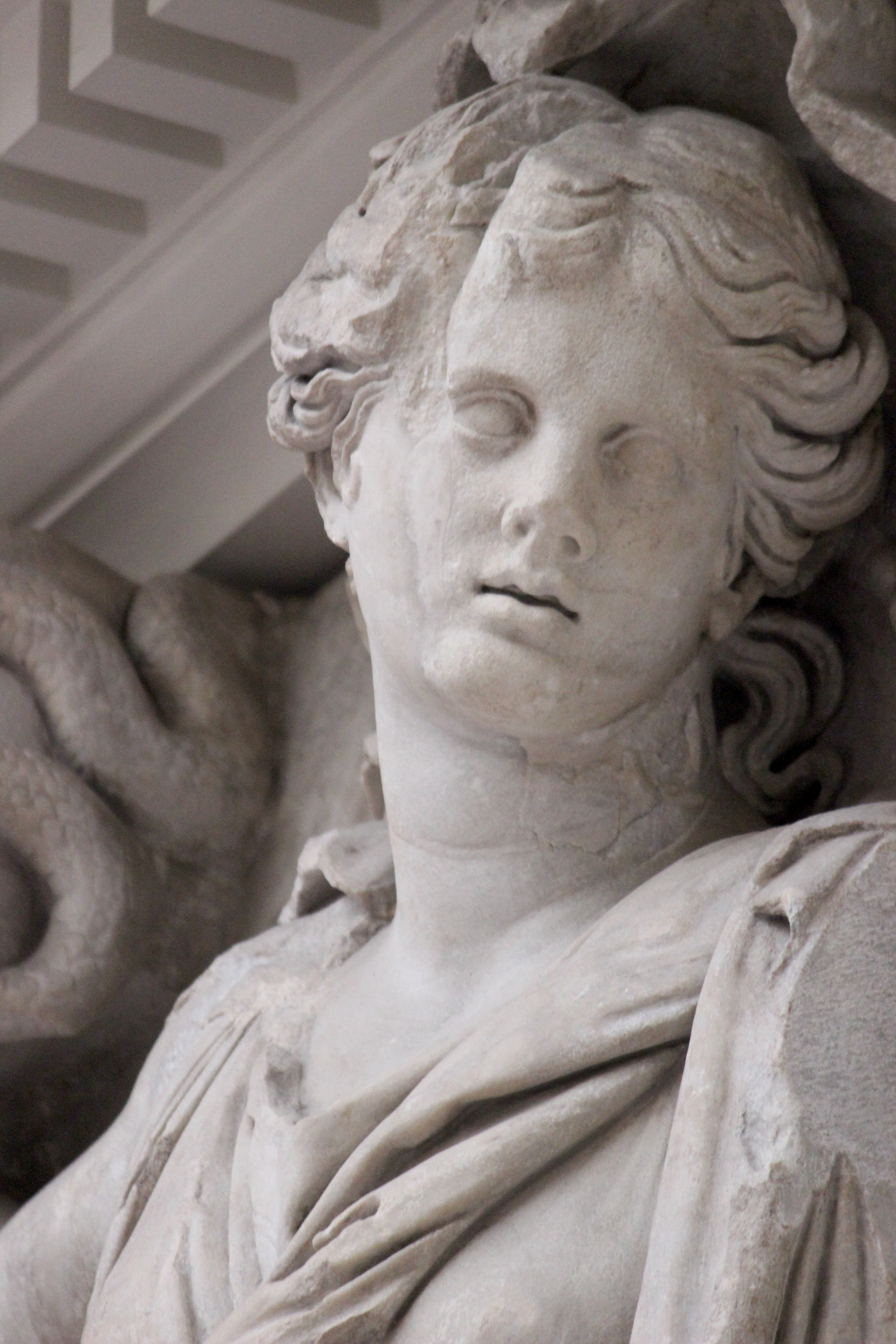 Las Moiras luchan contra los gigantes. Altar de Pérgamo.